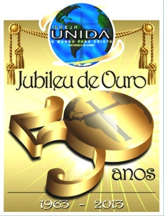 Logotipo alusivo ao Jubileu de Ouro da Igreja Unida